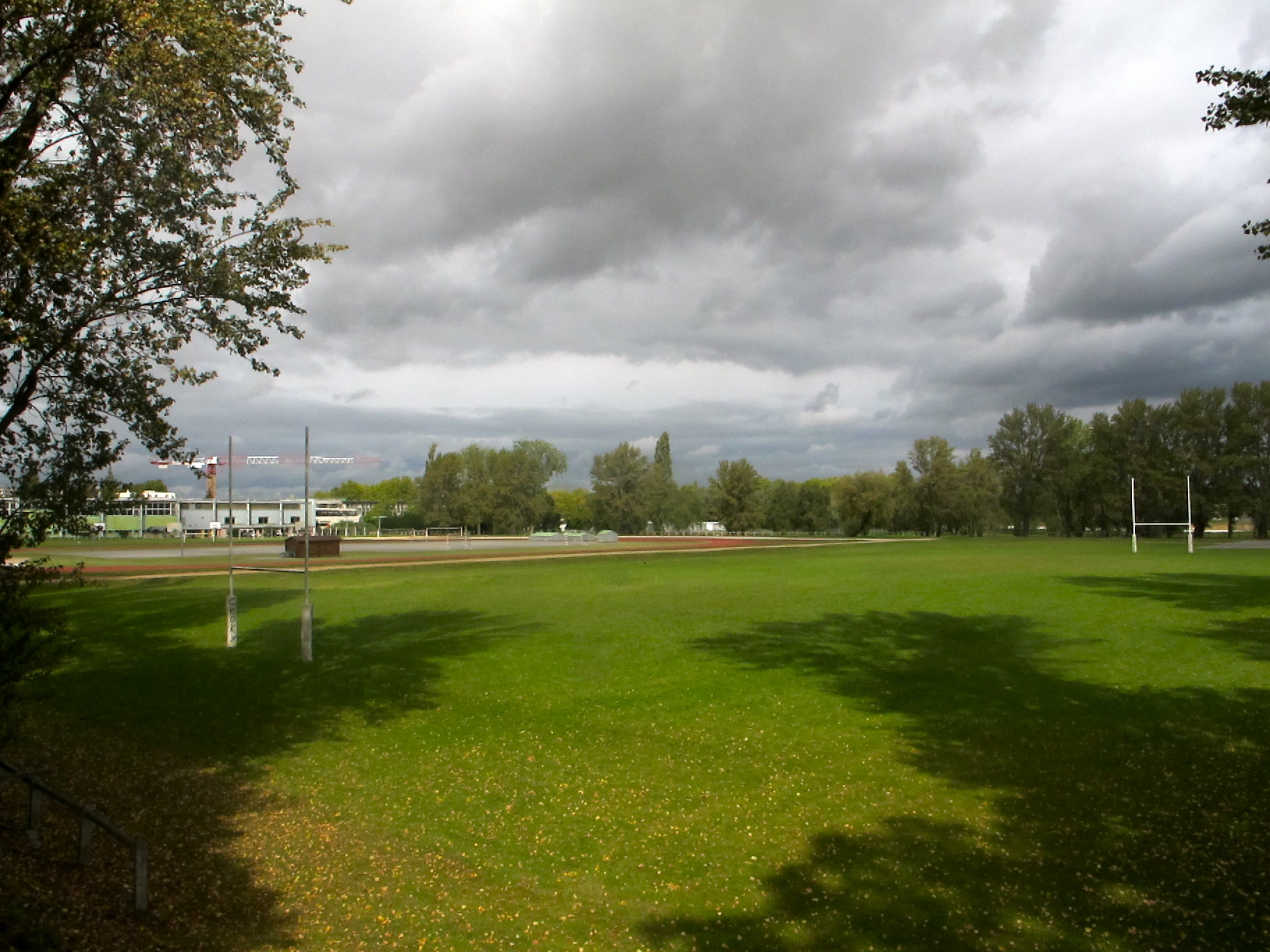 Terrain de rugby situé au lycée militaire de Saint-Cyr.